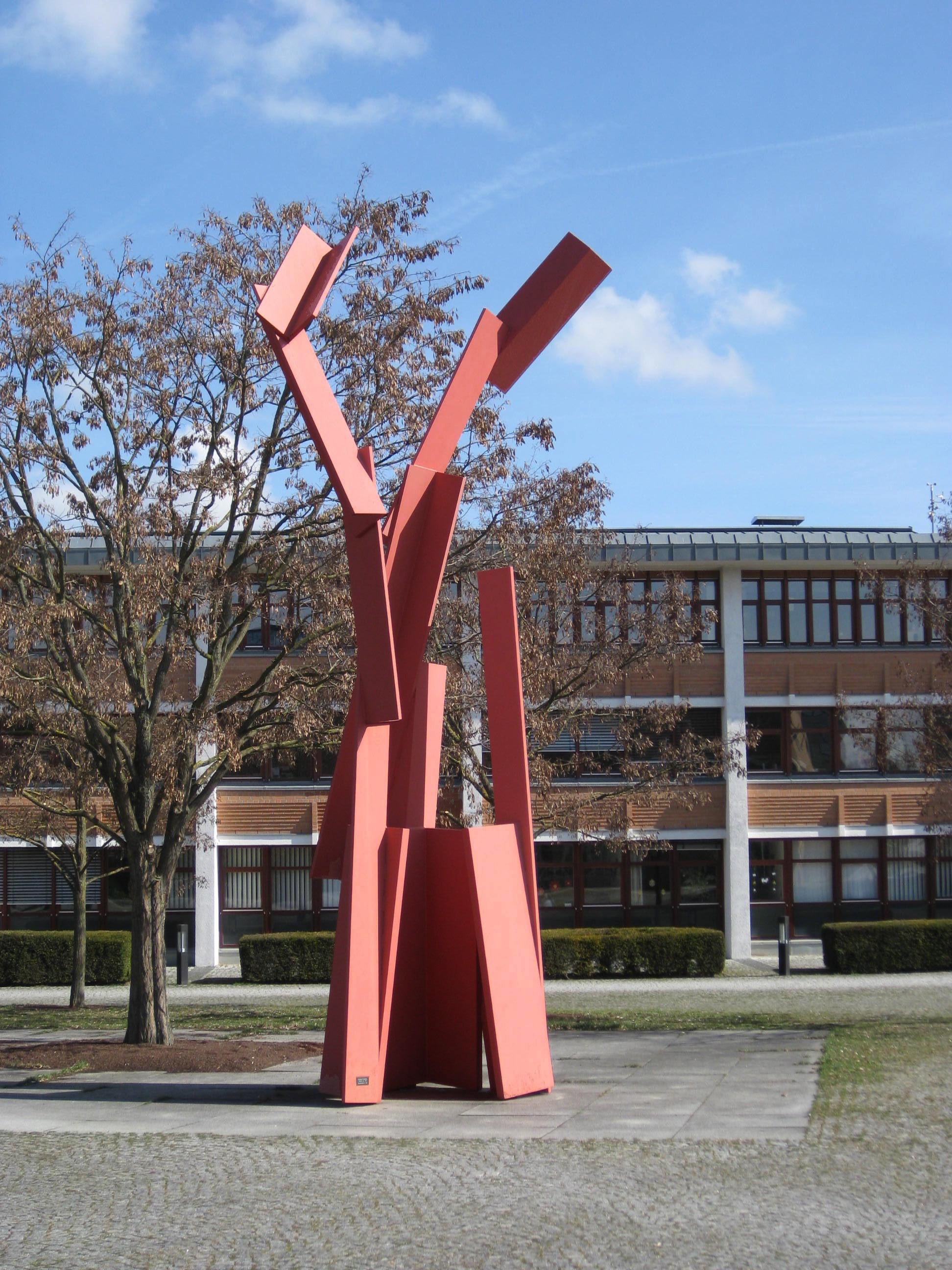 Christoph Freimann, Baumskulptur IV, 1994, vor dem Finanzamt, Böblingen, Deutschland